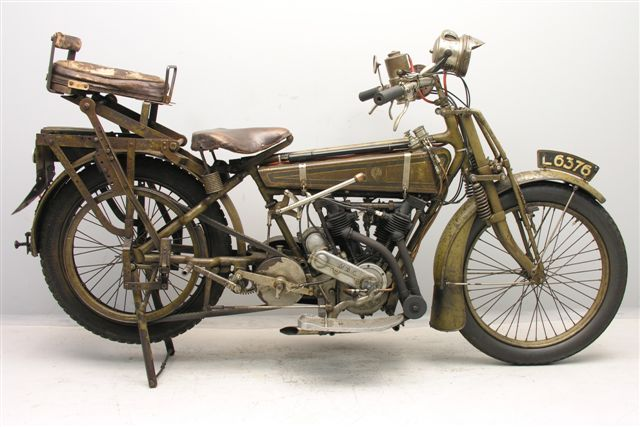 Simplex Amsterdam motorcycle from 1919 with Motosacoche 600 cc engine